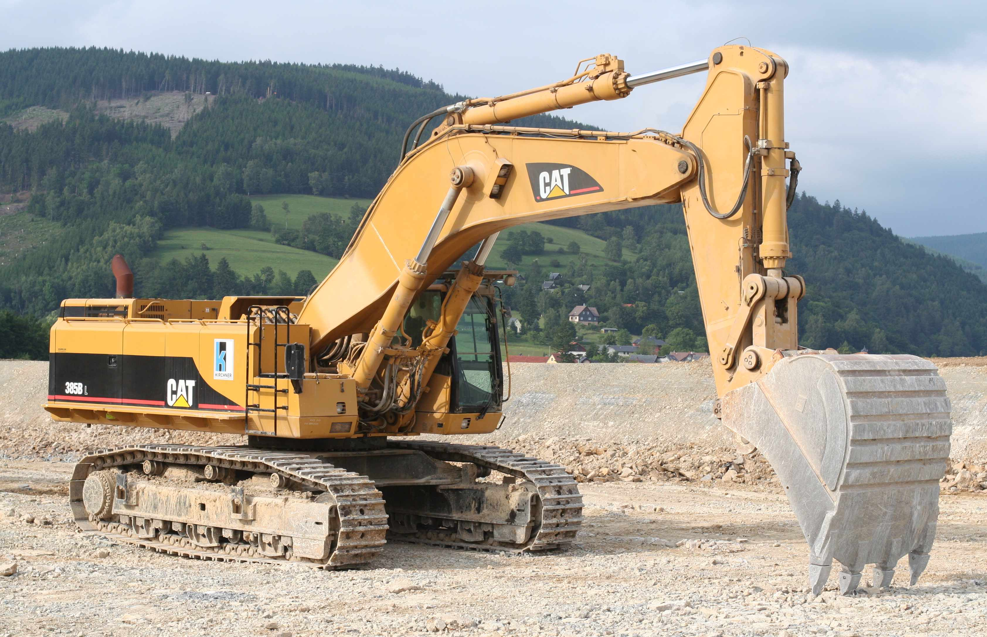 CAT 385 Raupenbagger